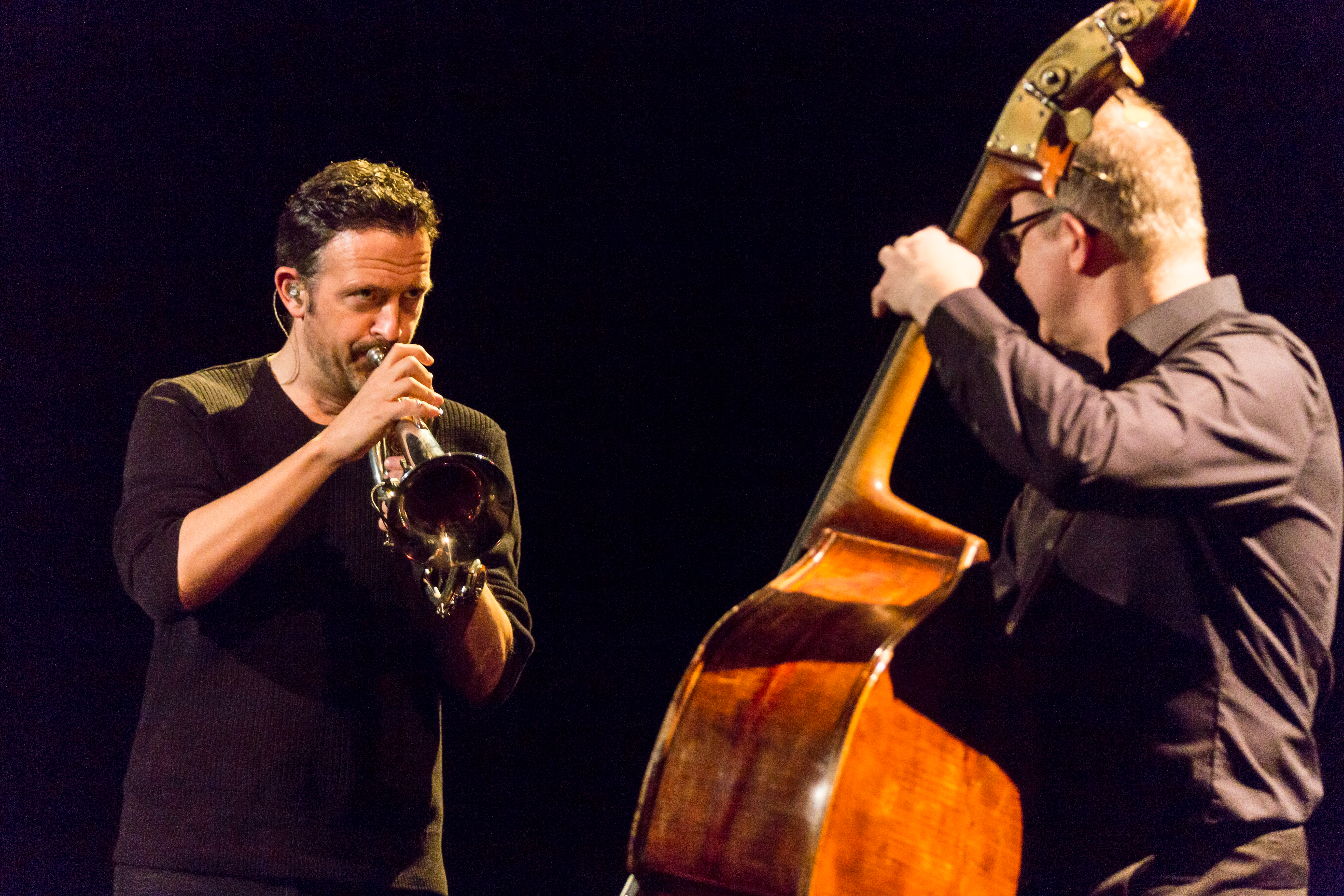 Auftritt der Künstler im Anhaltischen Theater Dessau